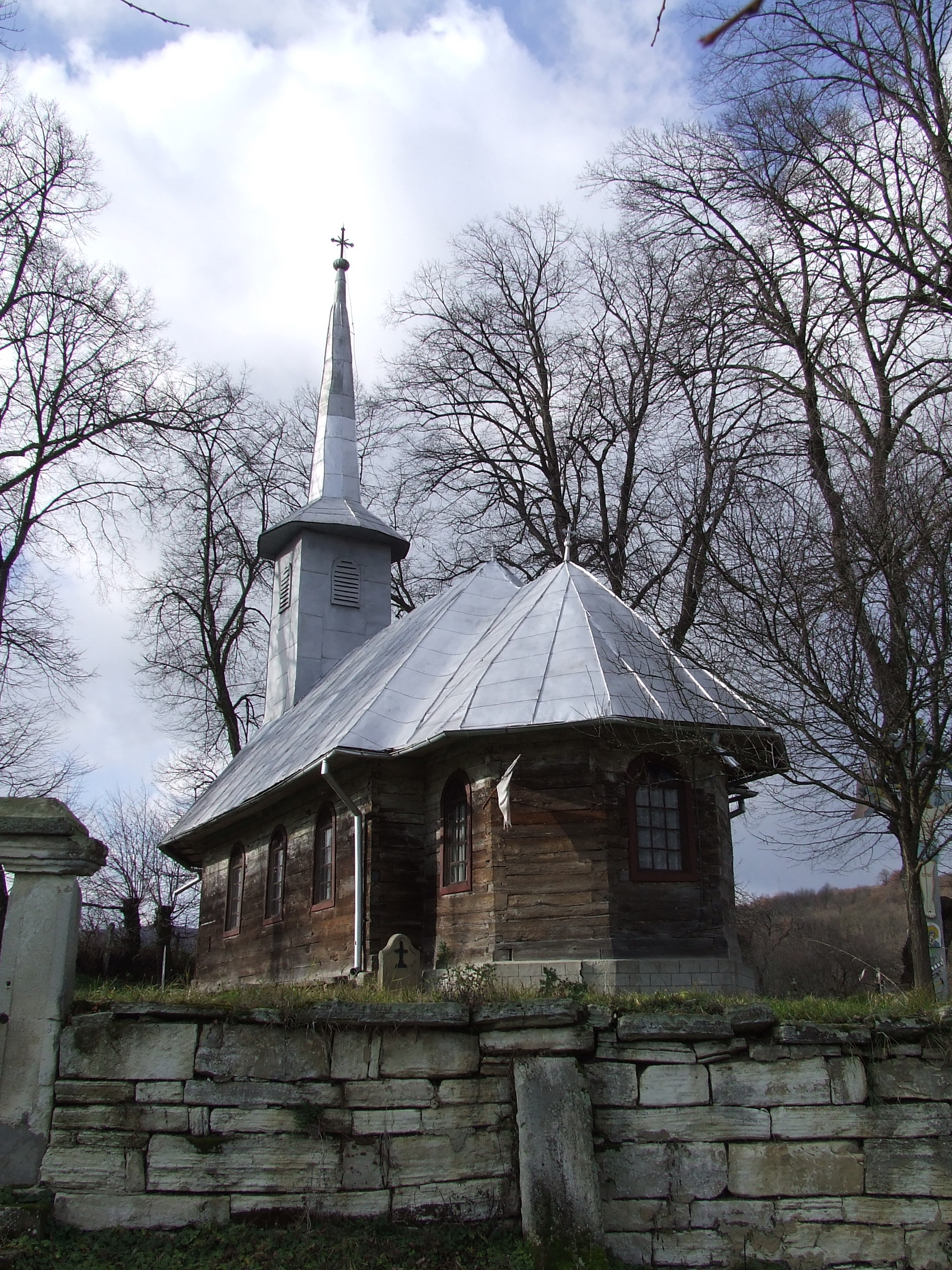 Biserica de lemn din Antăş